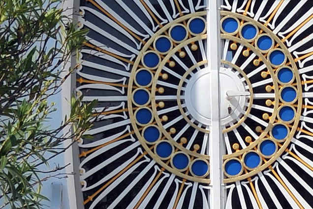 Wohnhaus Franz-Keim-Gasse 6, Detail der Haustür